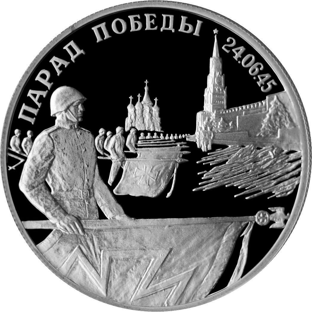 Монета Банка России — Серия: «Великая Отечественная война», 50-летие Победы в Великой Отечественной войне 1941—1945 гг., Парад Победы в Москве, Флаги у Кремлёвской стены, 2 рубля, реверс.